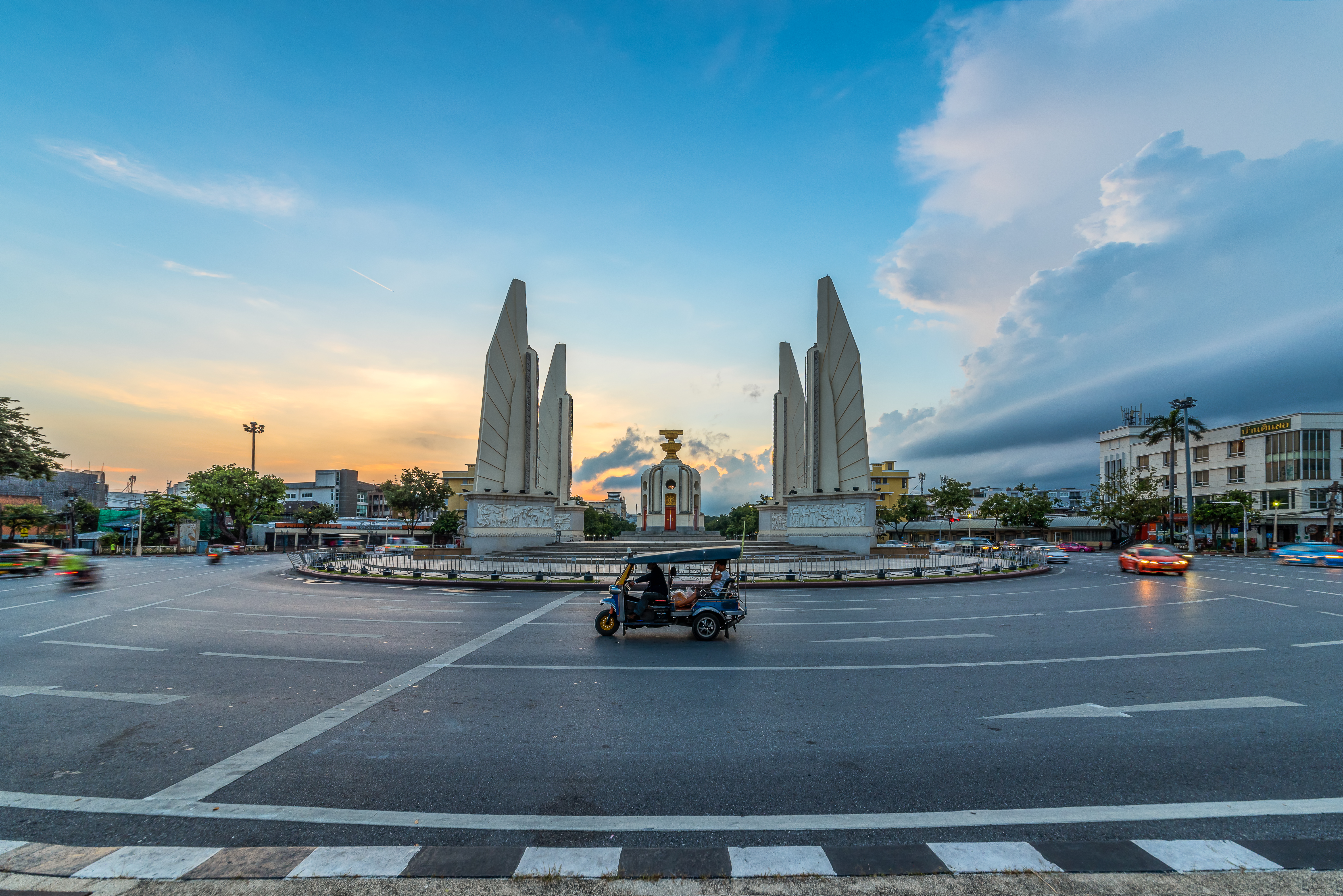 อนุสาวรีย์ประชาธิปไตย